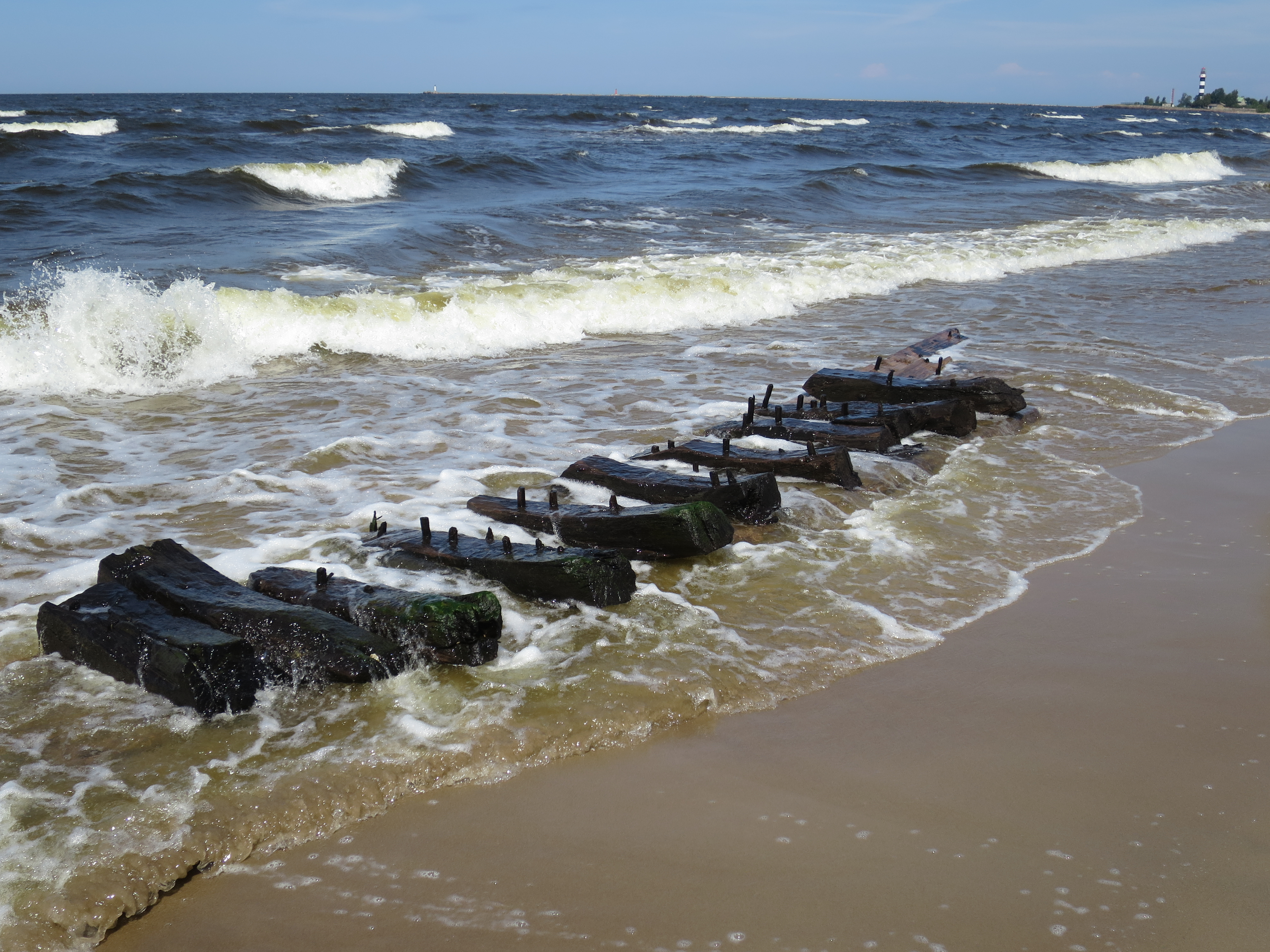 Daugavgrīvas pludmalē izskalotais vēsturiskā kuģa vraks.